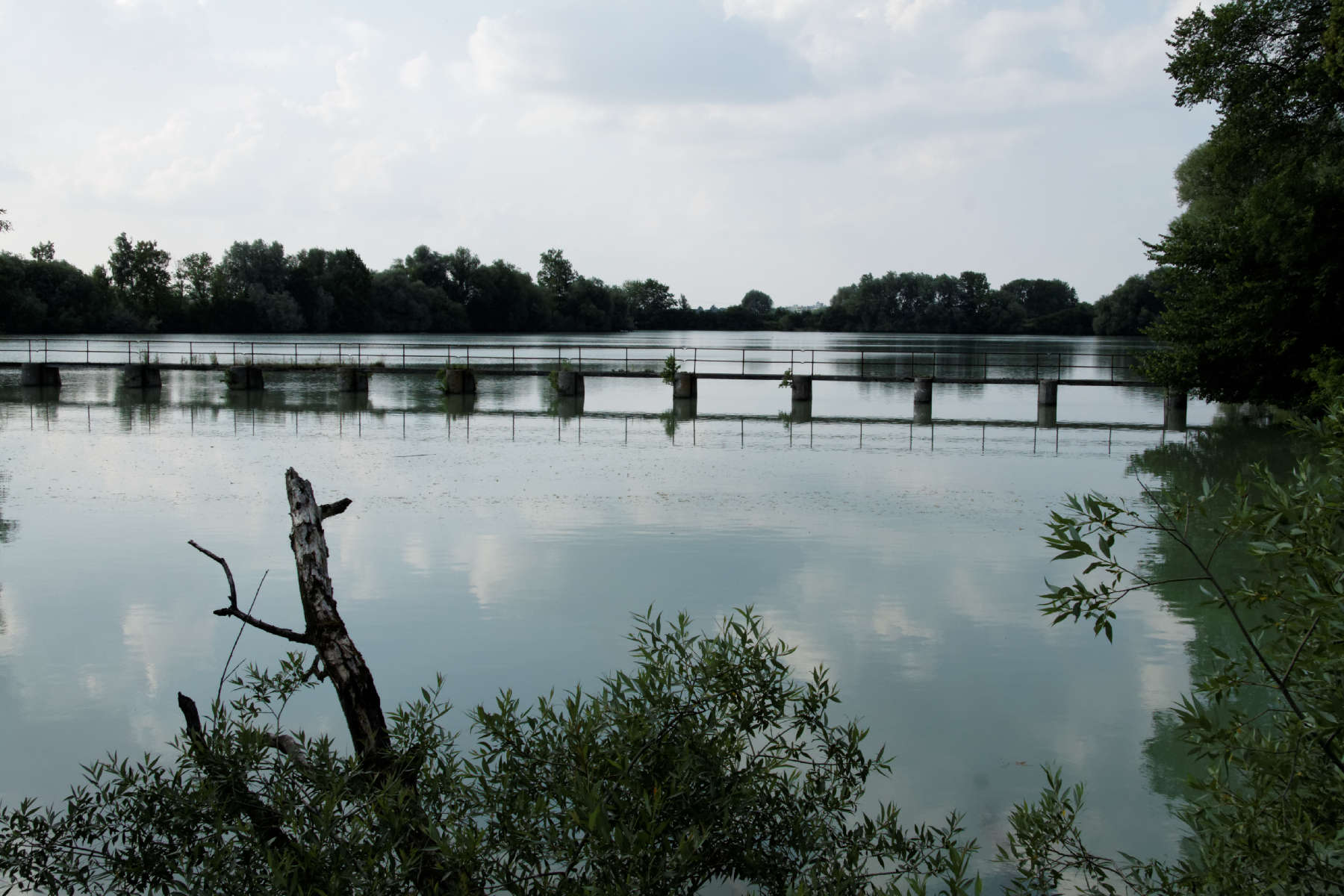 Unterföhring, Fischteich im Teichgut Birkenhof